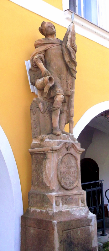 Zaclerz, Plac Rychorski, figura św. Floriana